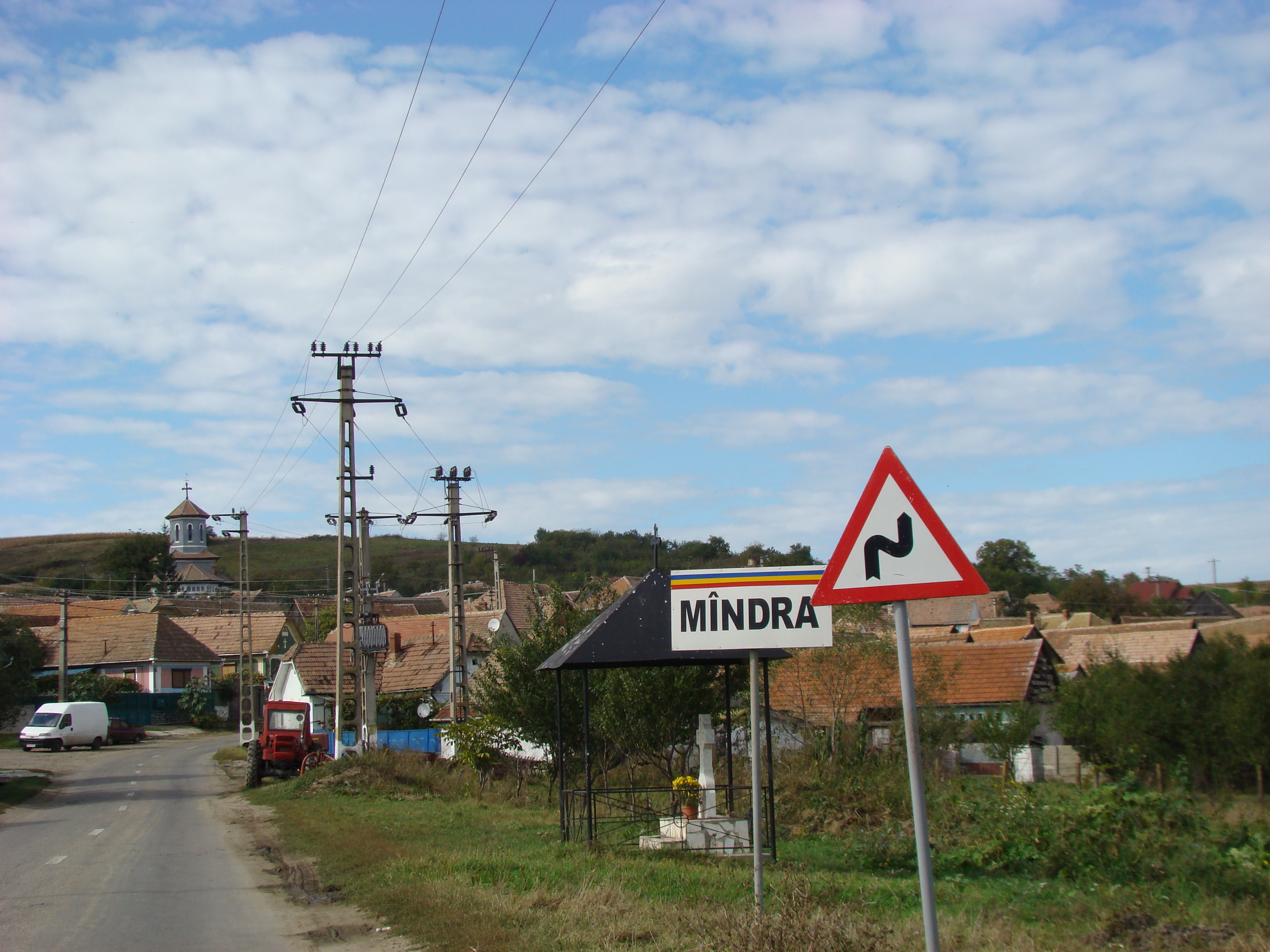 Mândra, Sibiu